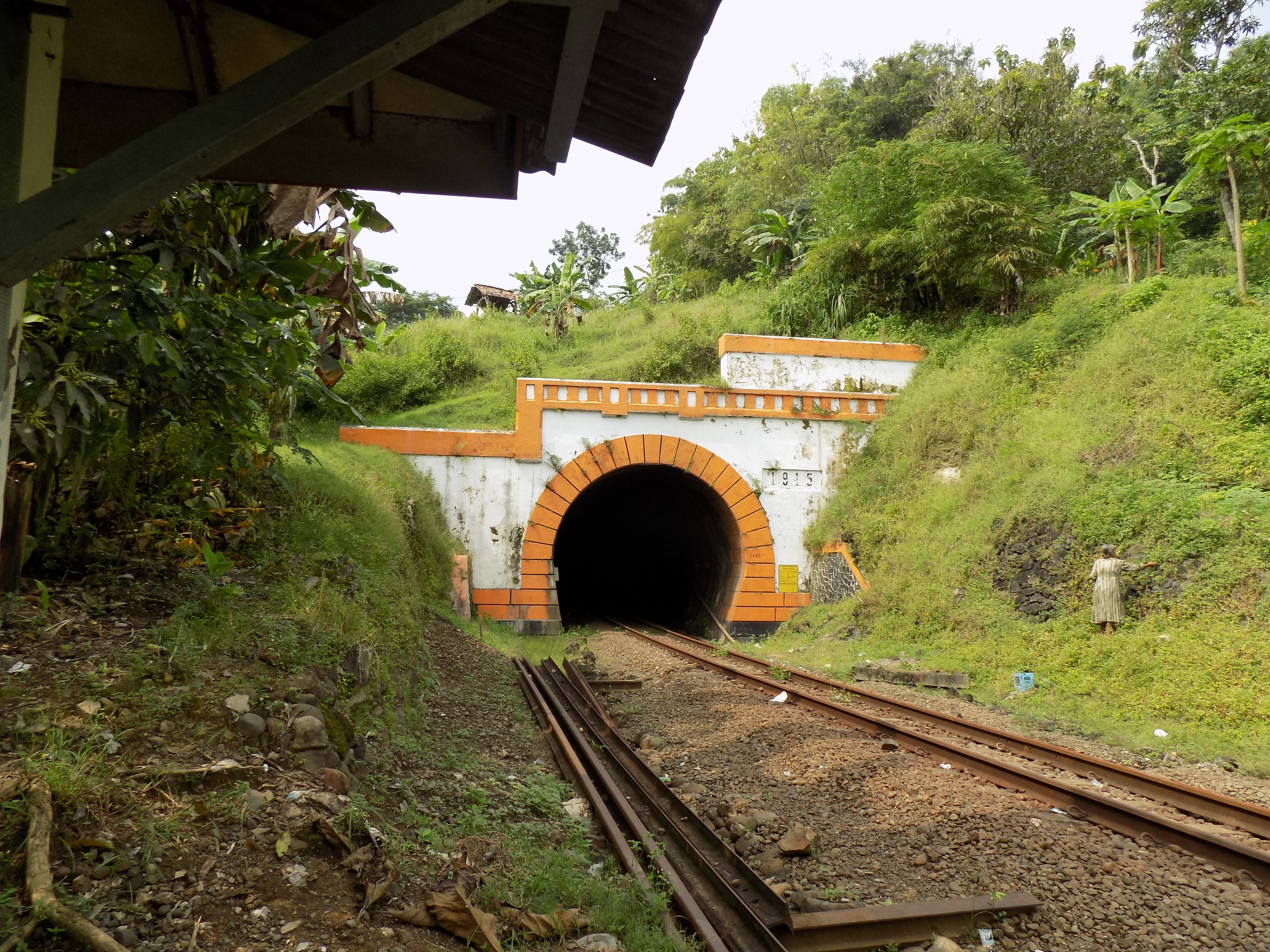 Terowongan Notog Lama